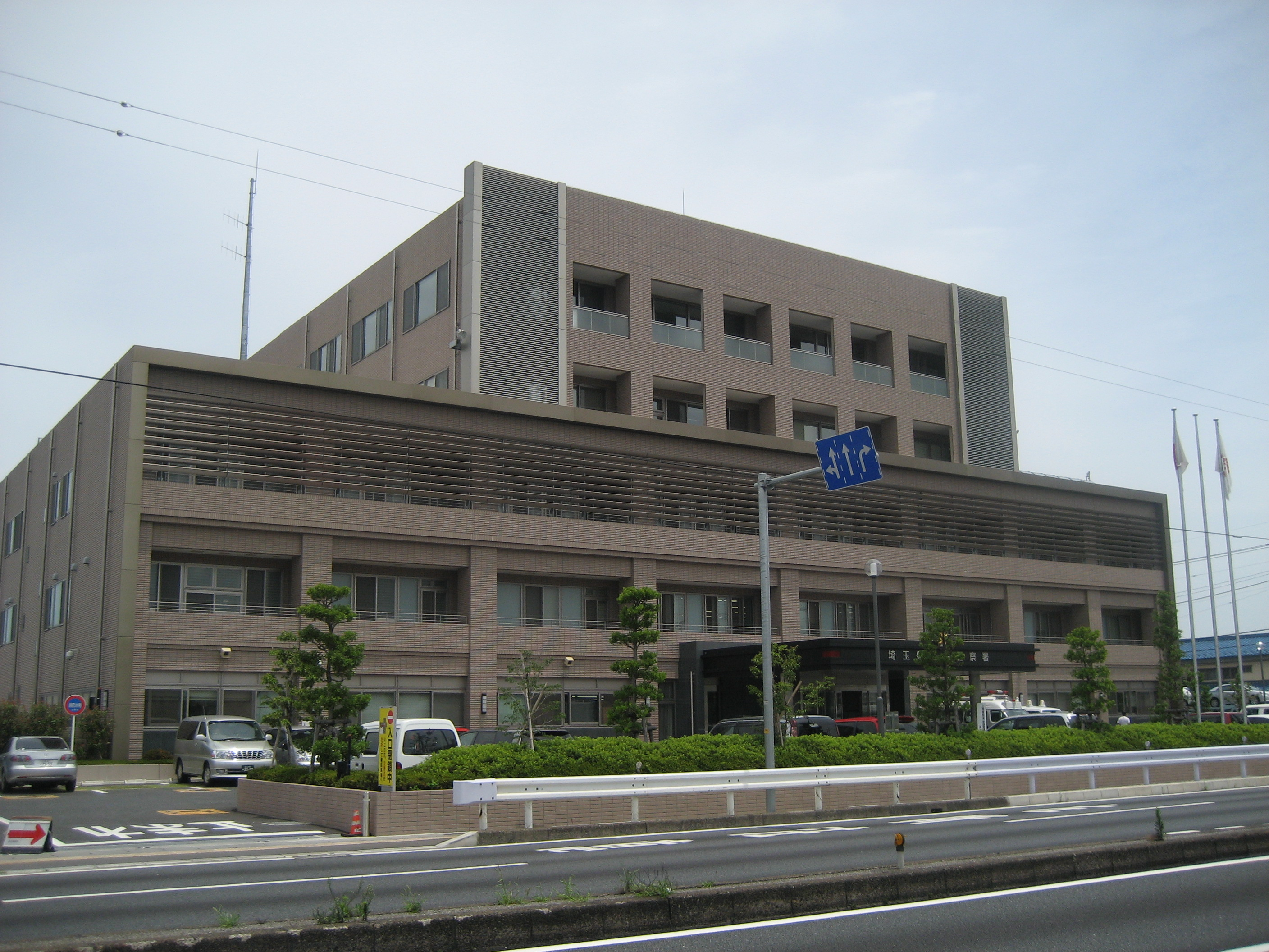 埼玉県上尾警察署庁舎